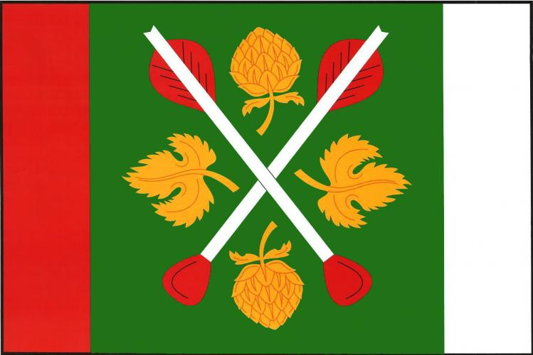 Vlajka obce Bílsko u Hořic, okres Jičín. List tvoří tři svislé pruhy, červený, zelený a bílý, v poměru 1 : 4 : 1. V zeleném pruhu k dolnímu okraji listu obrácené zkřížené bílé kluky s červeným opeřením a hroty, nahoře a dole provázené chmelovou šišticí, po stranách chmelovým listem, vše žluté a odvrácené. Poměr šířky k délce listu je 2 : 3.